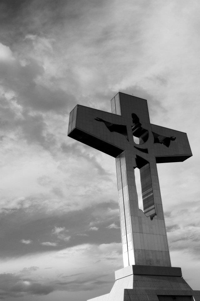 Cristo Chiapas en una distancia aproximandamente 7 mtros de distancia,que se alcansa a ver toda la obra maestra del Cristo Chiapas